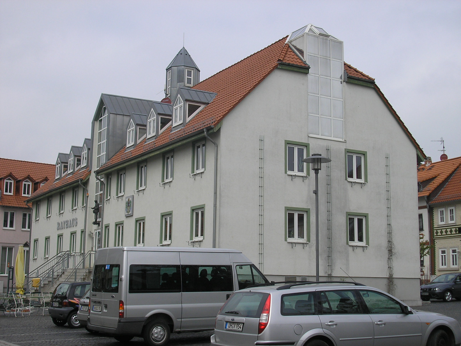 Das Rathaus von Schlotheim (Thüringen).